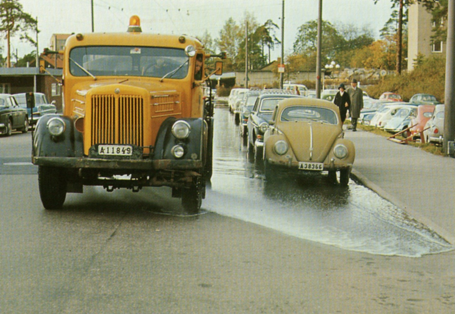 Vattenspolning av gata i Stockholm